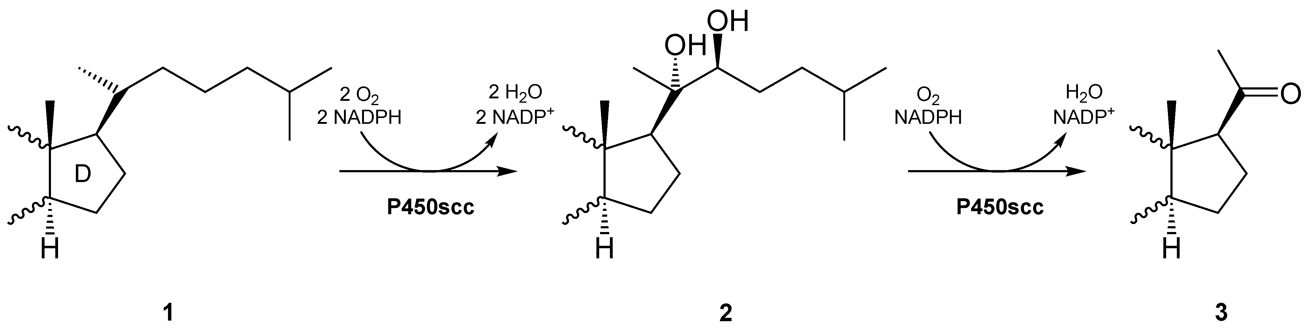 Synthese von Pregnolon ausgehend von Cortisol